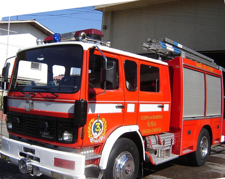 Fotografía del Carro bomba Renault-Camiva Midlum 170, de la Tercera Compañía del Cuerpo de Bomberos de Ñuñoa.